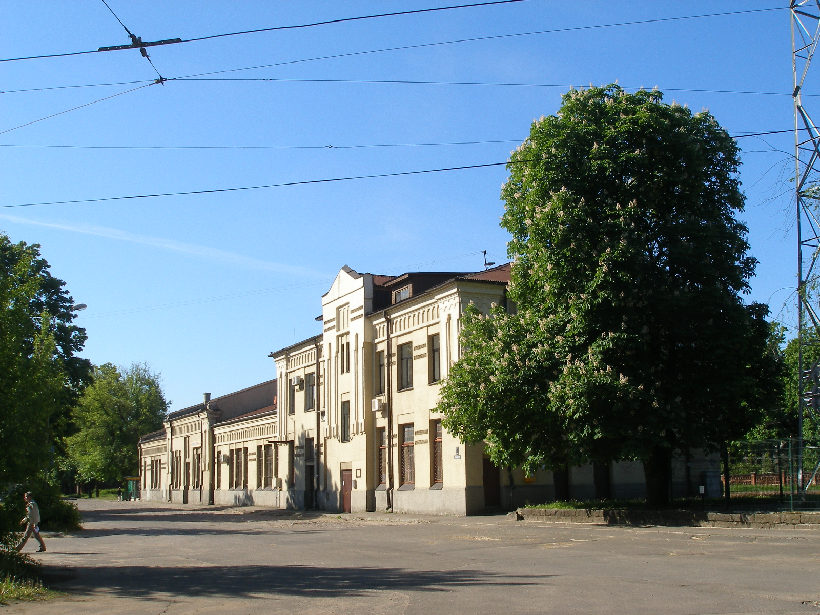 Zasulauka stacijas ēka no Tapešu ielas puses.